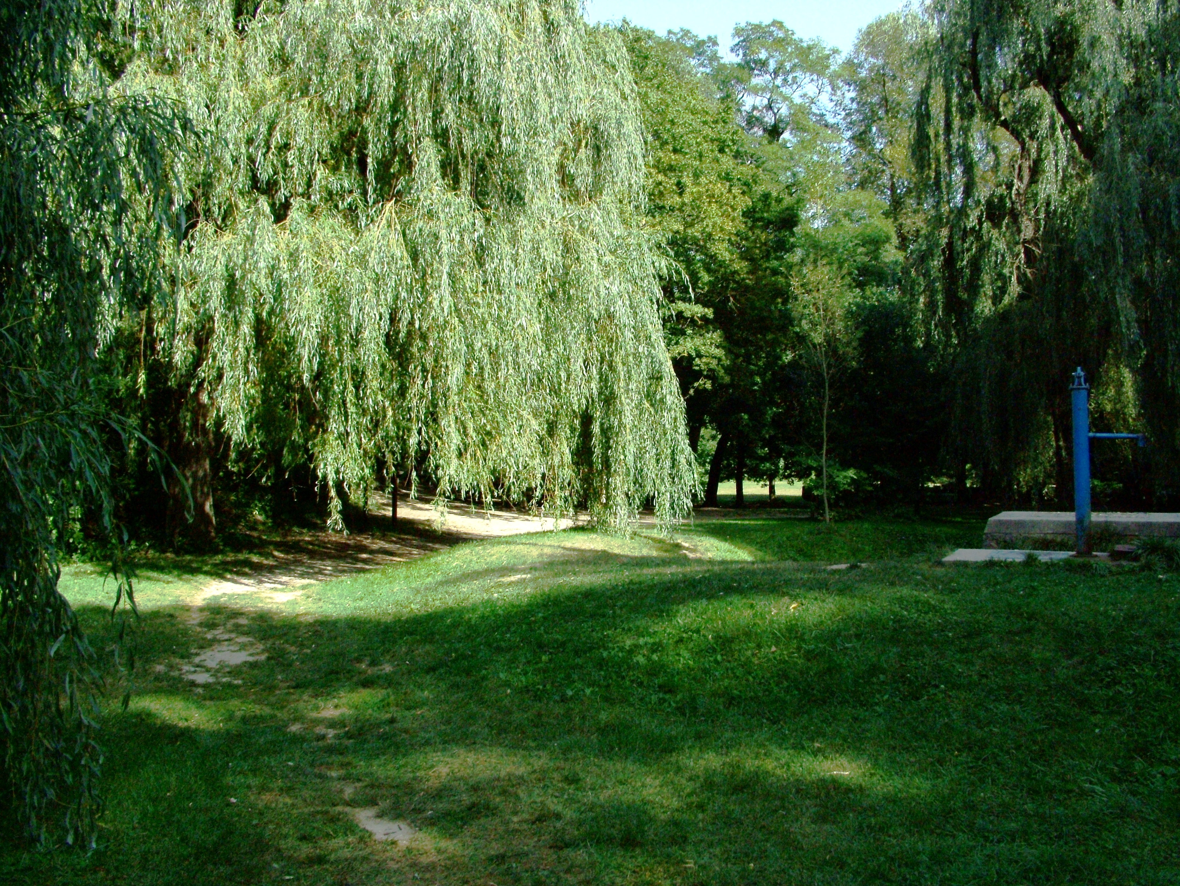 Koloska-völgy (Balatonfüred)